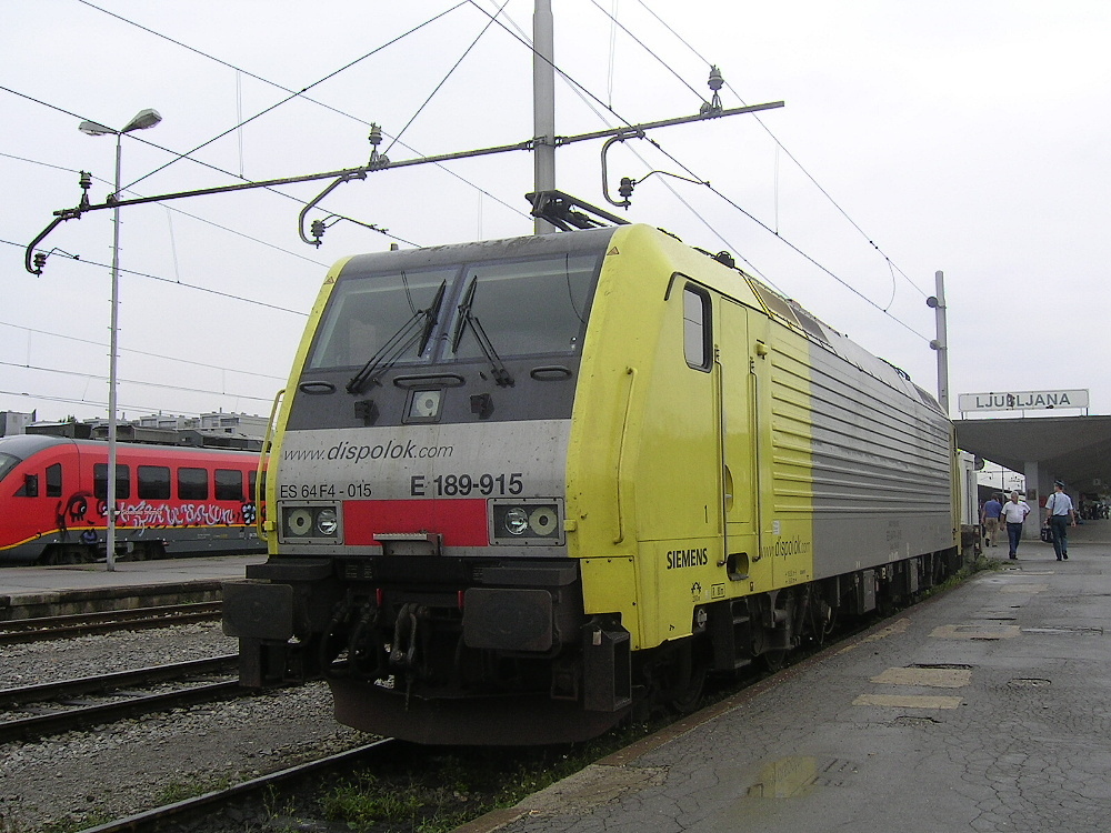 Lokomotiva ES 64 F4 pronajatá soukromému slovinskému dopravci společností Dispolok čeká na svůj výkon ve stanici Ljubljana ve Slovinsku.